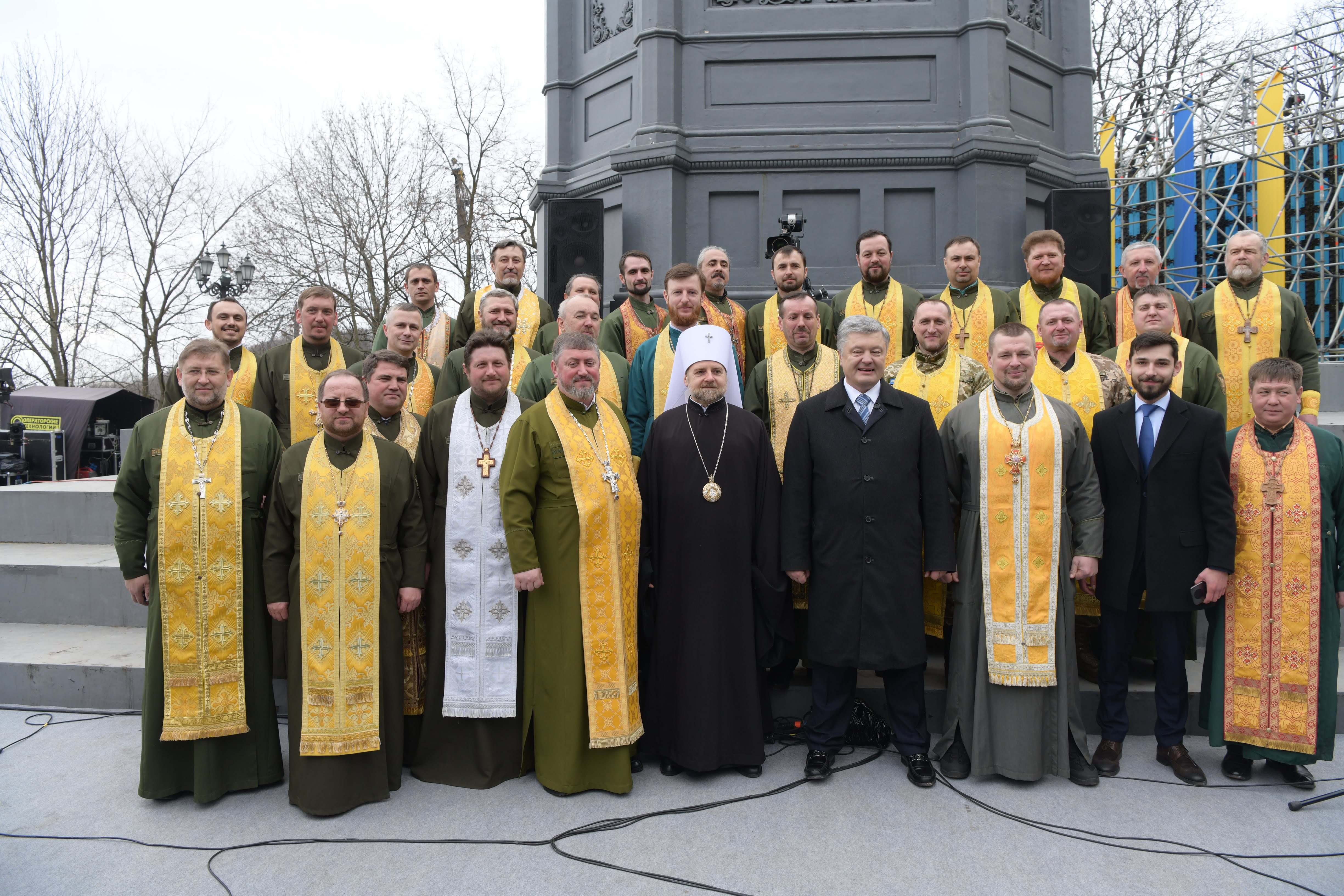 Капелани СУВД і президент України Петро Порошенко на міжконфесійній молитві за мир